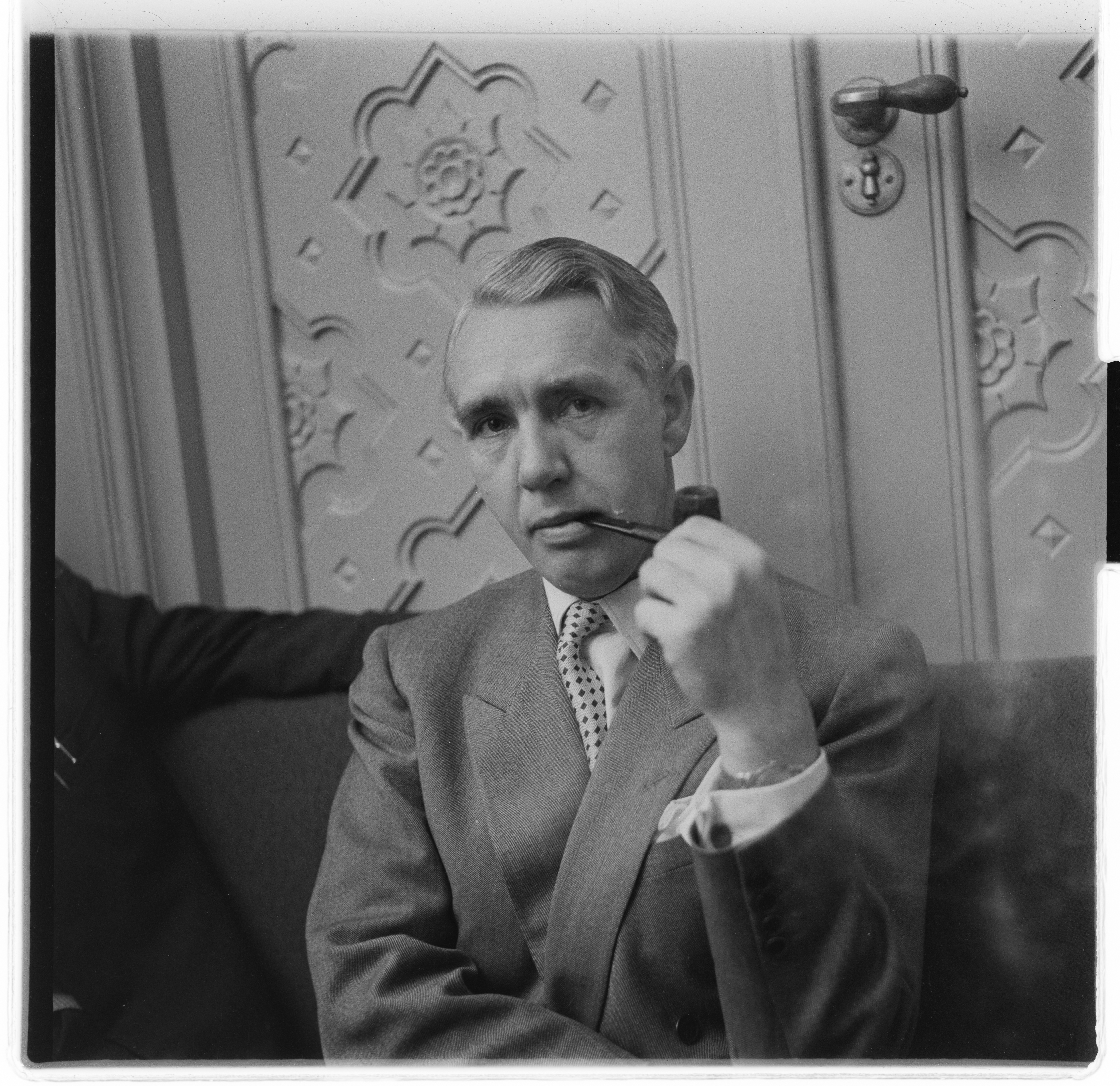 Bildet er hentet fra Arkivverket. Stortinget 1954. NÅ nr. 3, 1954. Arkivinstitusjon : Riksarkivet Arkivnavn : Billedbladet NÅ Sted : Norge, Oslo, Oslo, Stortinget Emneord: Stortinget, Menn Avbildet